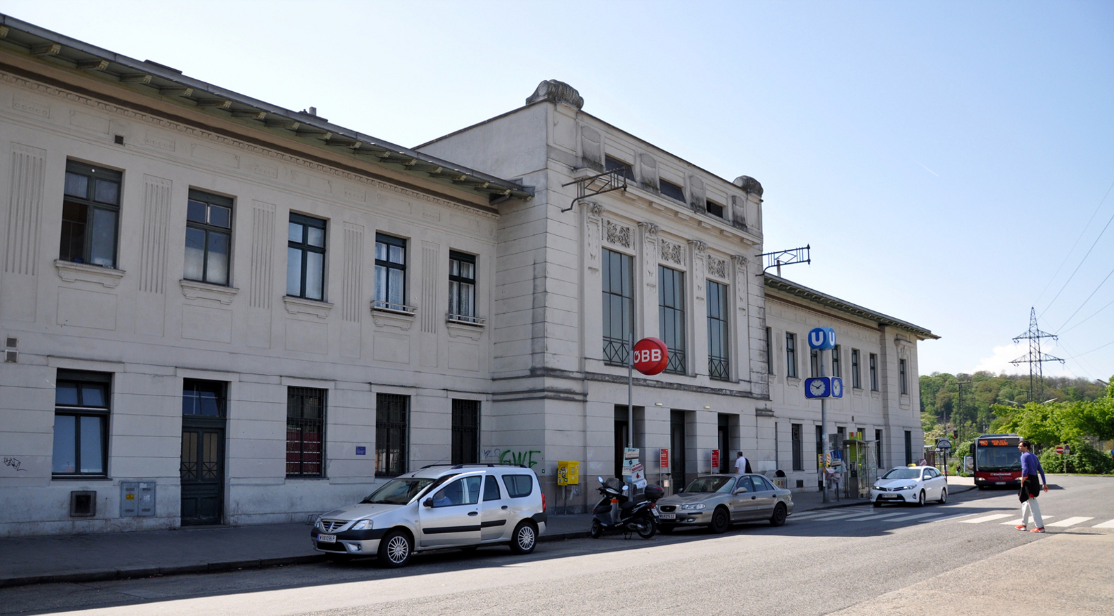 ÖBB, U4 Hütteldorf